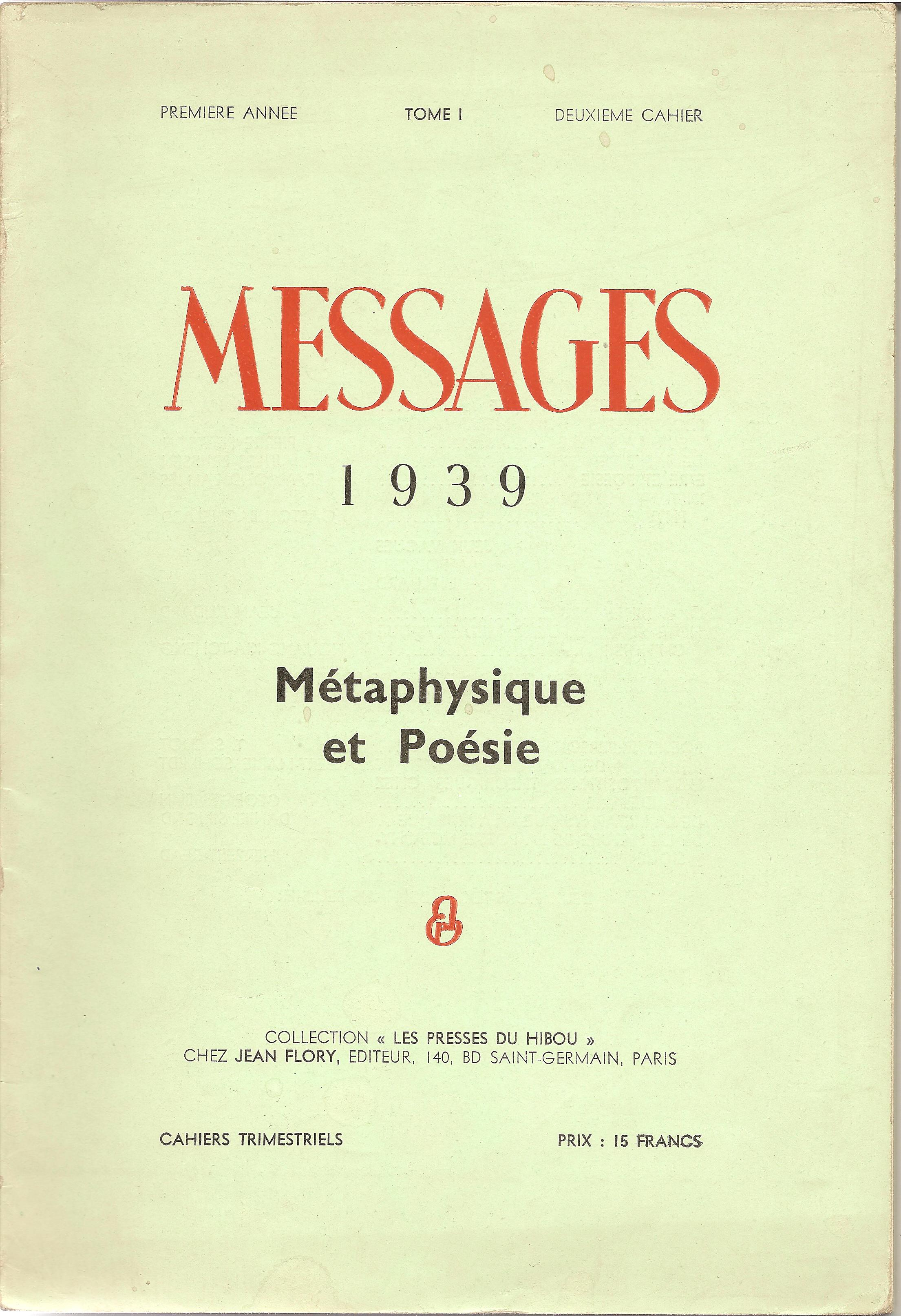 Couverture de la revue Messages 1939 dirigée par Jean Lescure